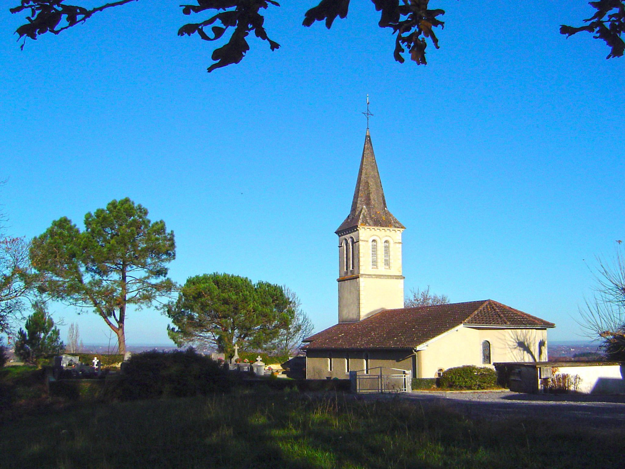 Eglise de Castelner, Landes, FranceOccitan : Glèisa de Castèth Ner ; Shalòssa ; Gasconha